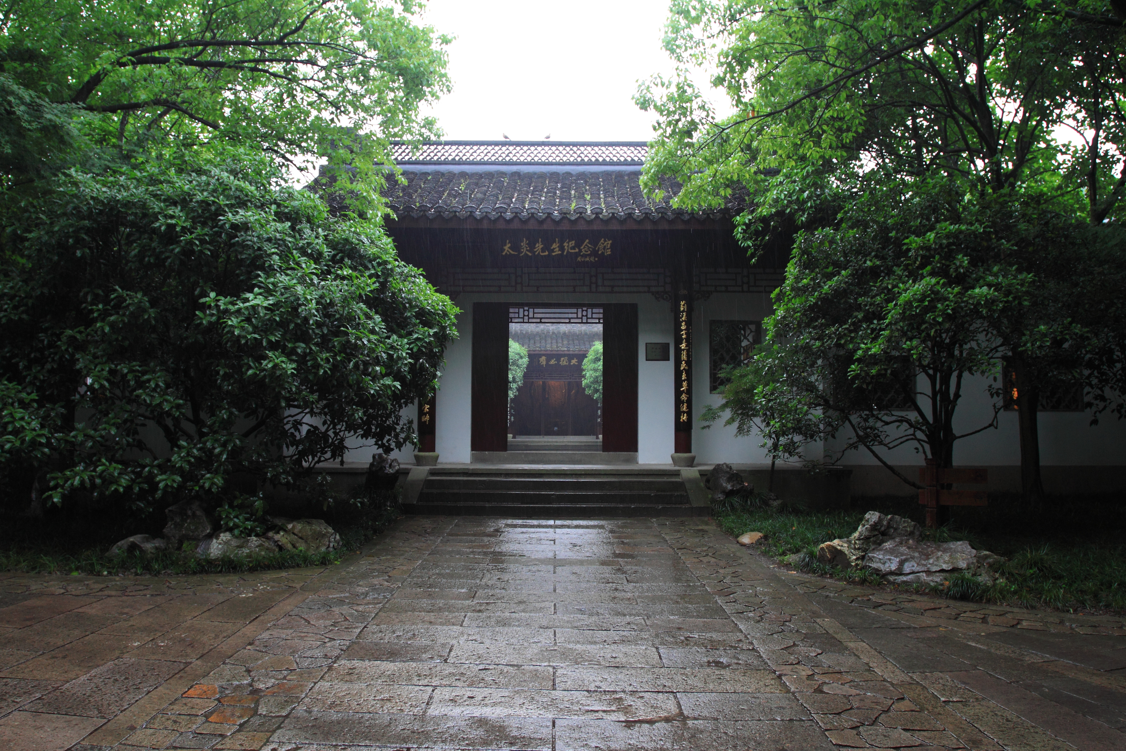 中国浙江杭州章太炎纪念馆。